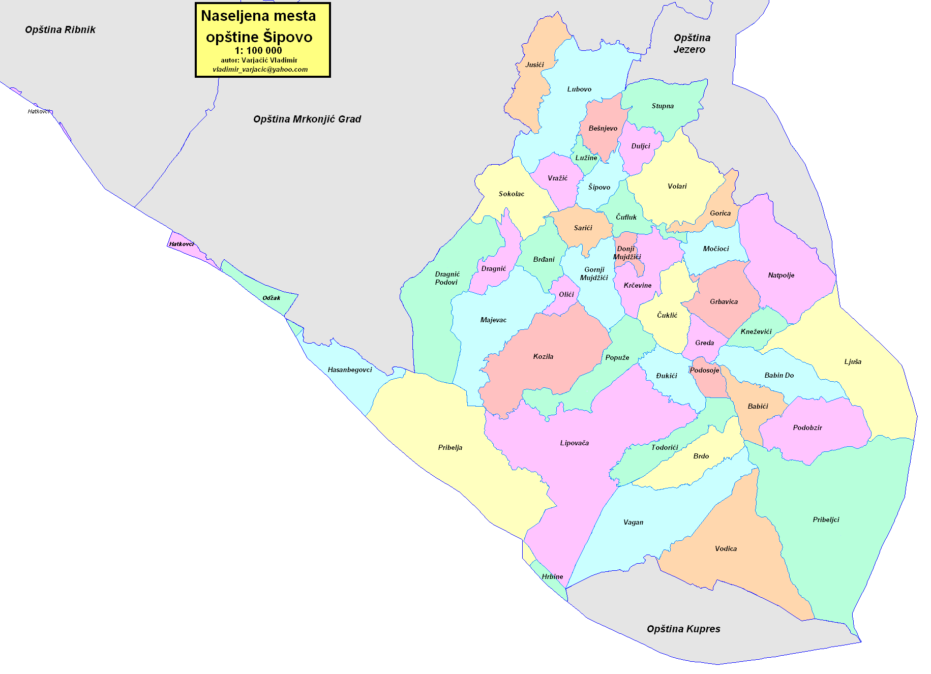 Opština Šipovo